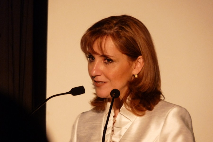 Gloria Guevara Manzo, Secrétaire du Tourisme du Mexique